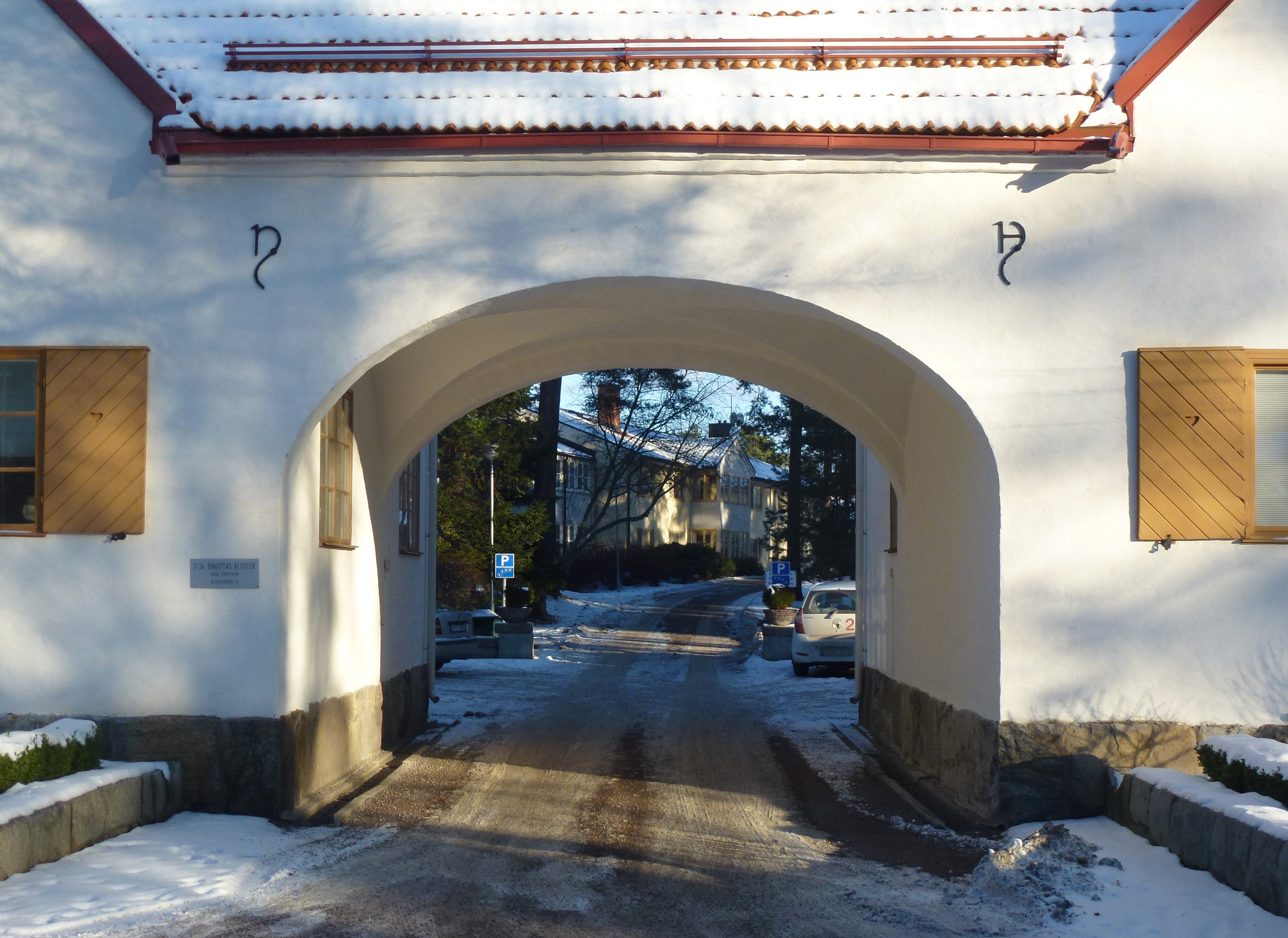 Birgittasystrarnas entréhus, Burevägen 12, arkitekt Evert Milles